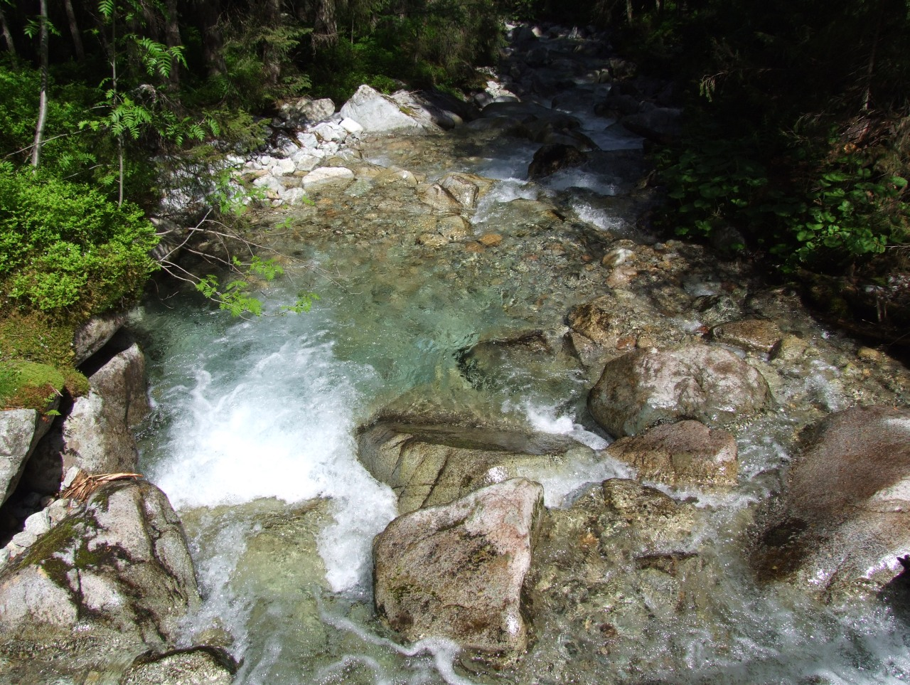 Rówienkowy Potok przy ścieżce niebieskiego szlaaku turystycznego przez Dolinę Białej Wody w Tatrach